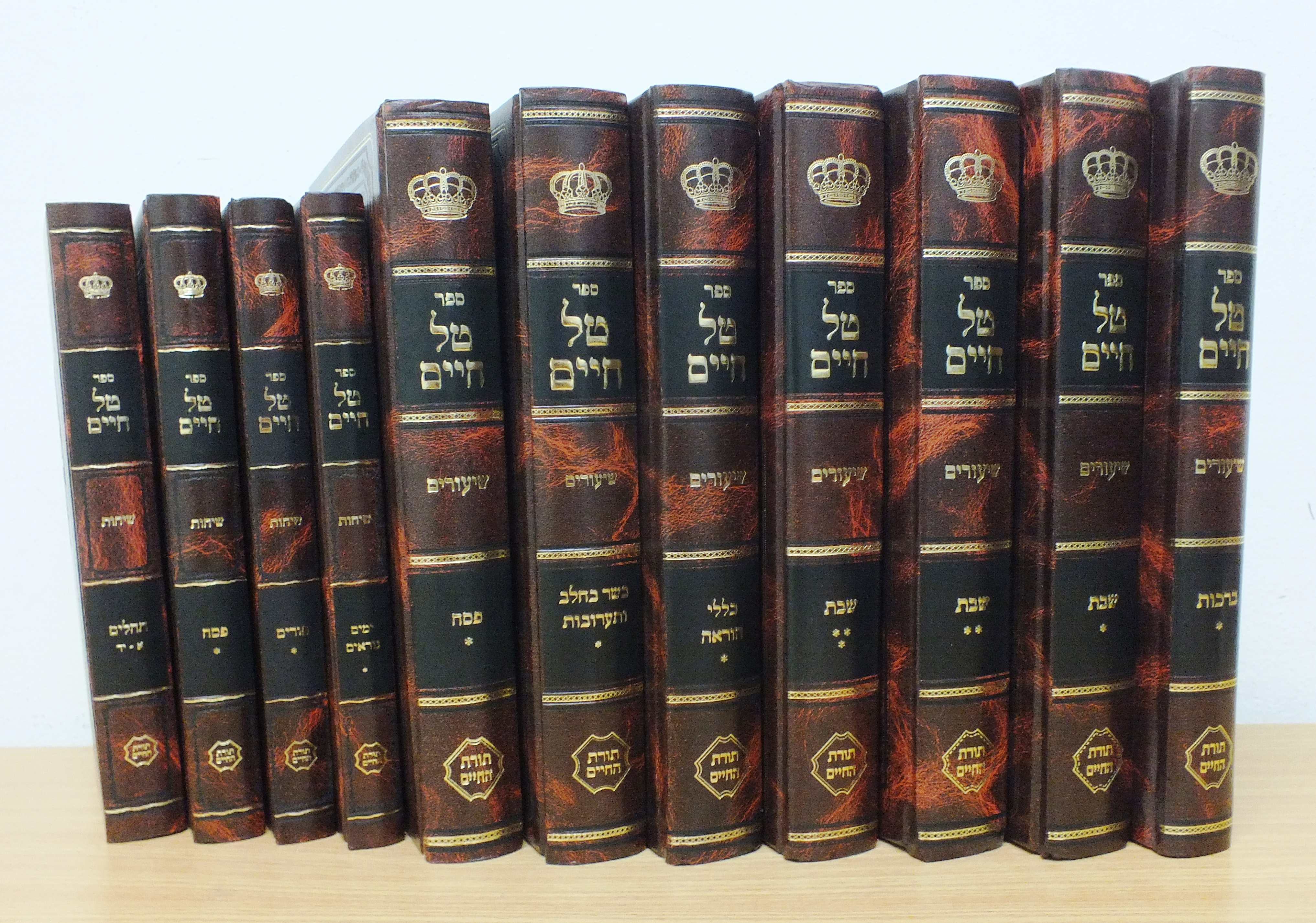 סדרת ספרי טל חיים, מאת הרב שמואל טל, שיצאו עד לשנת תשע"ז